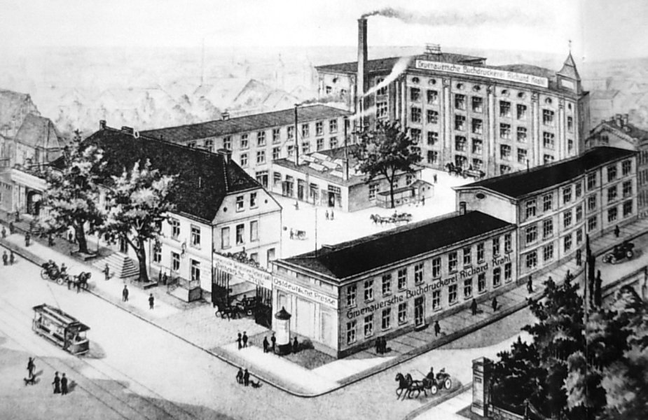 Drukarnia Grunauera w Bydgoszczy, późniejsze Zakłady Graficzne im. Komisji Edukacji Narodowej